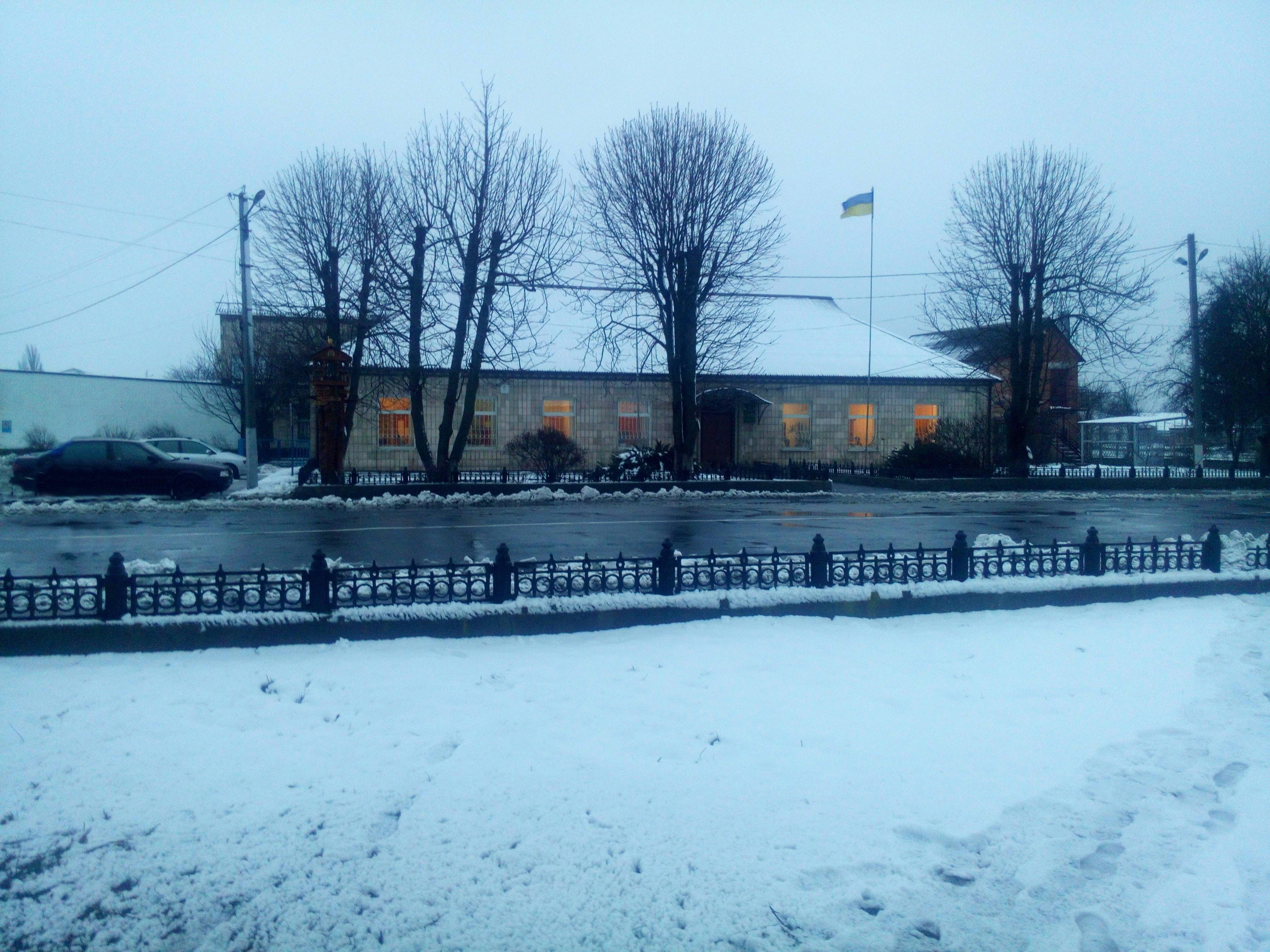 Будівля, де знаходиться заводська міська рада Полтавської області